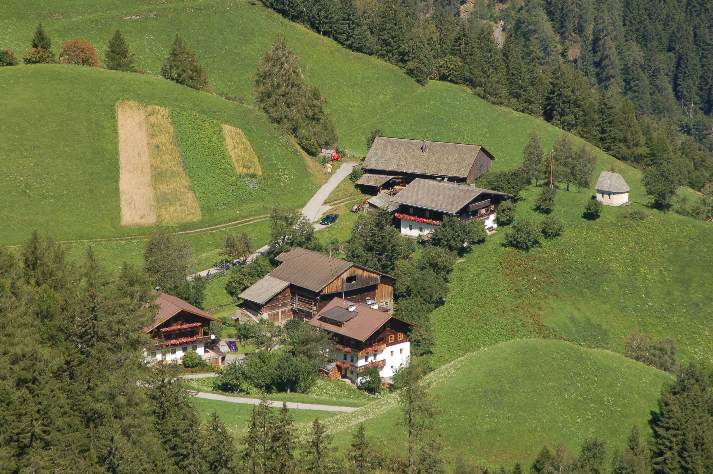 Der Weiler Guggenberg des Weilers Ganz (Gemeinde Matrei in Osttirol), rechts die Kapelle des Bauernhofs Niggler